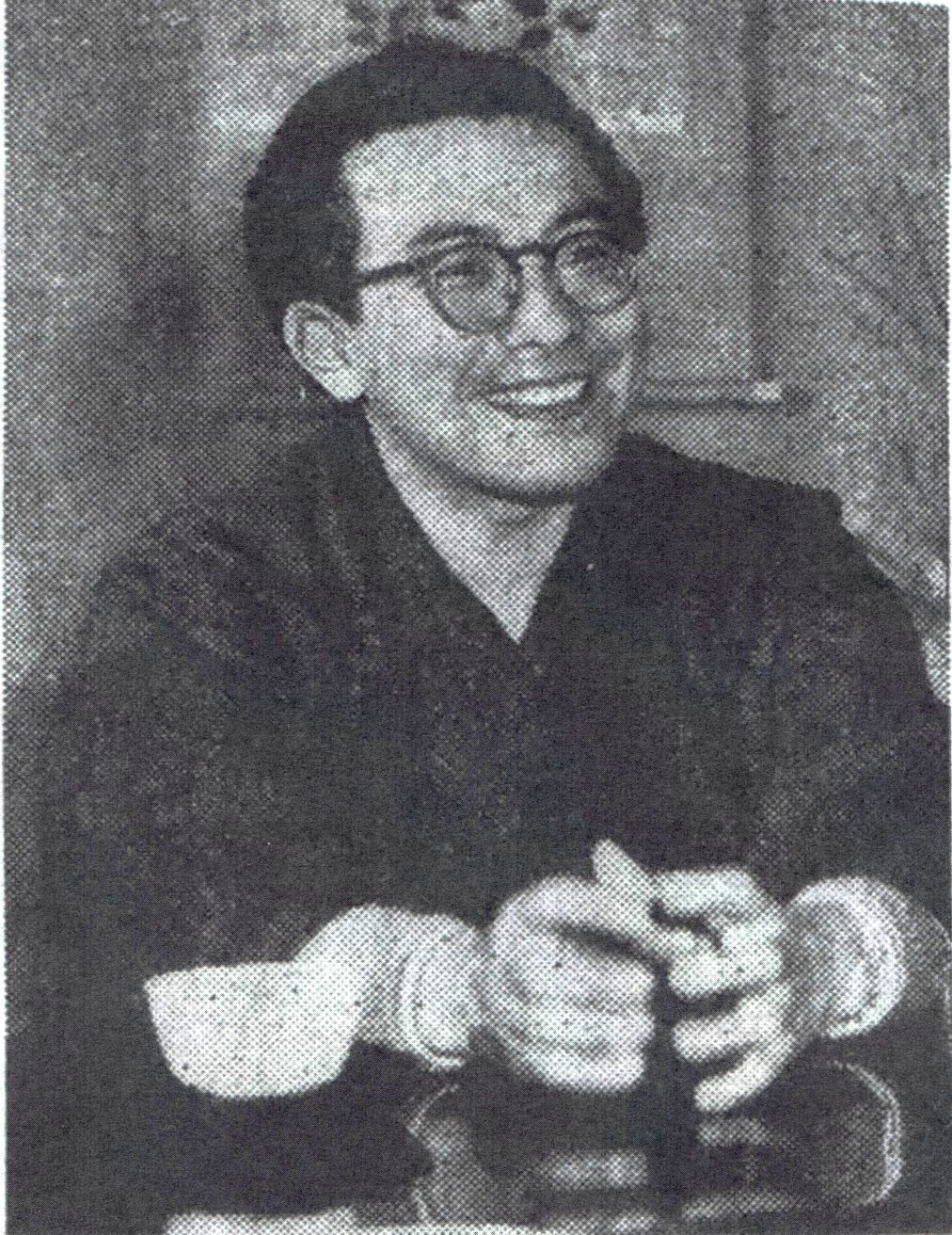 読売新聞社『週刊娯楽よみうり』第2巻第10号(1956)より西条凡児